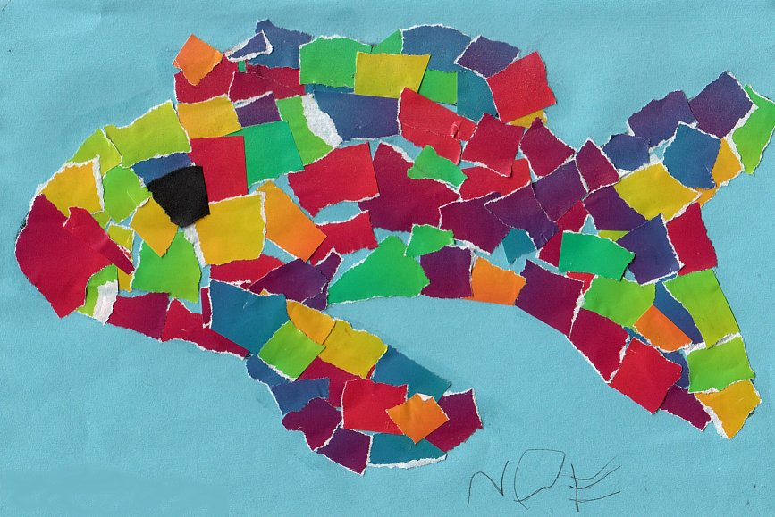 Kinderkunstwerk aus Papierschnipseln (Geschenk von Noe an Marc, 2005)